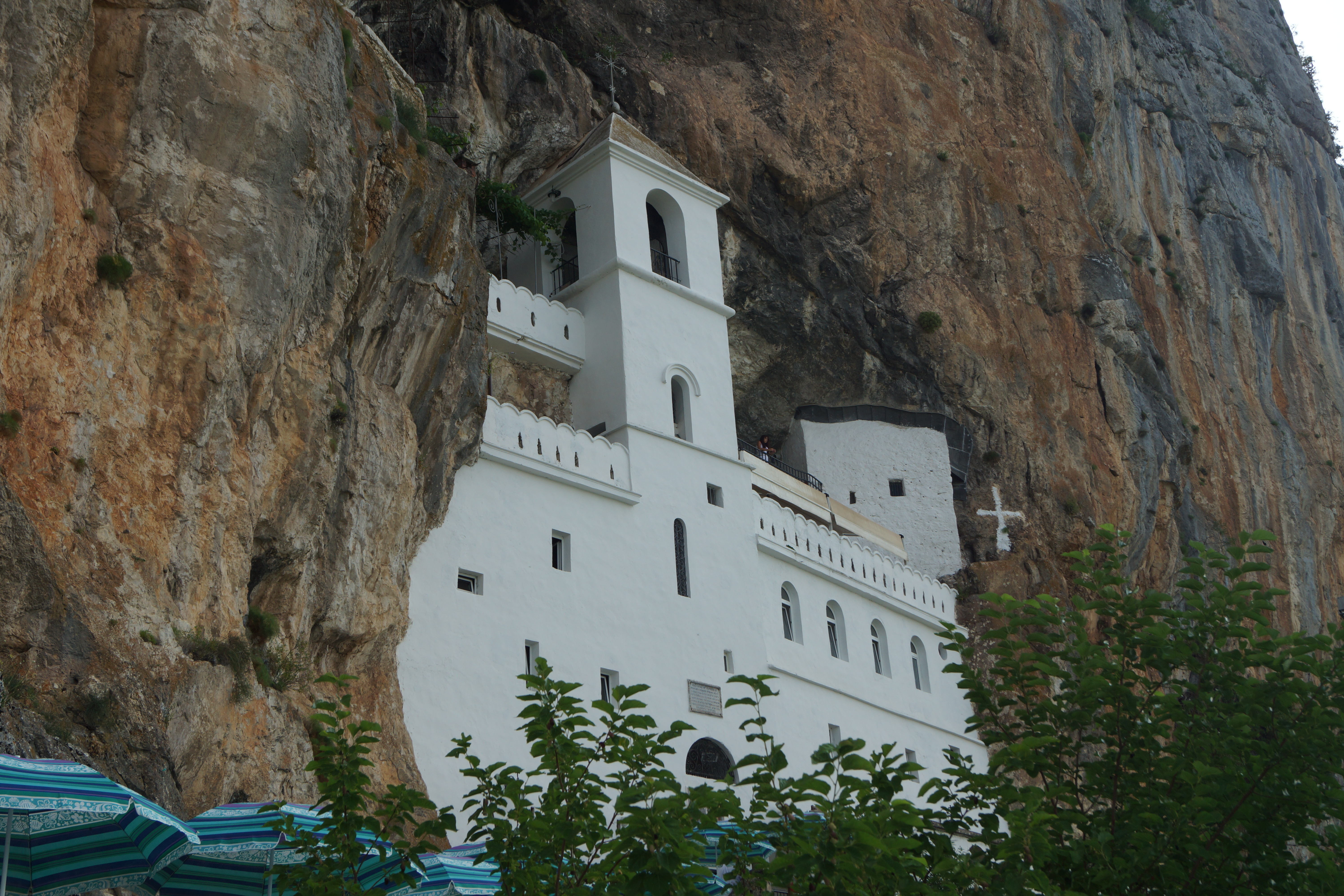 Manastir Ostrog